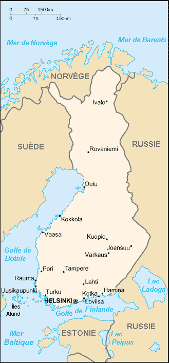 Carte de Finlande. Auteur : CIA Source : CIA Factbook